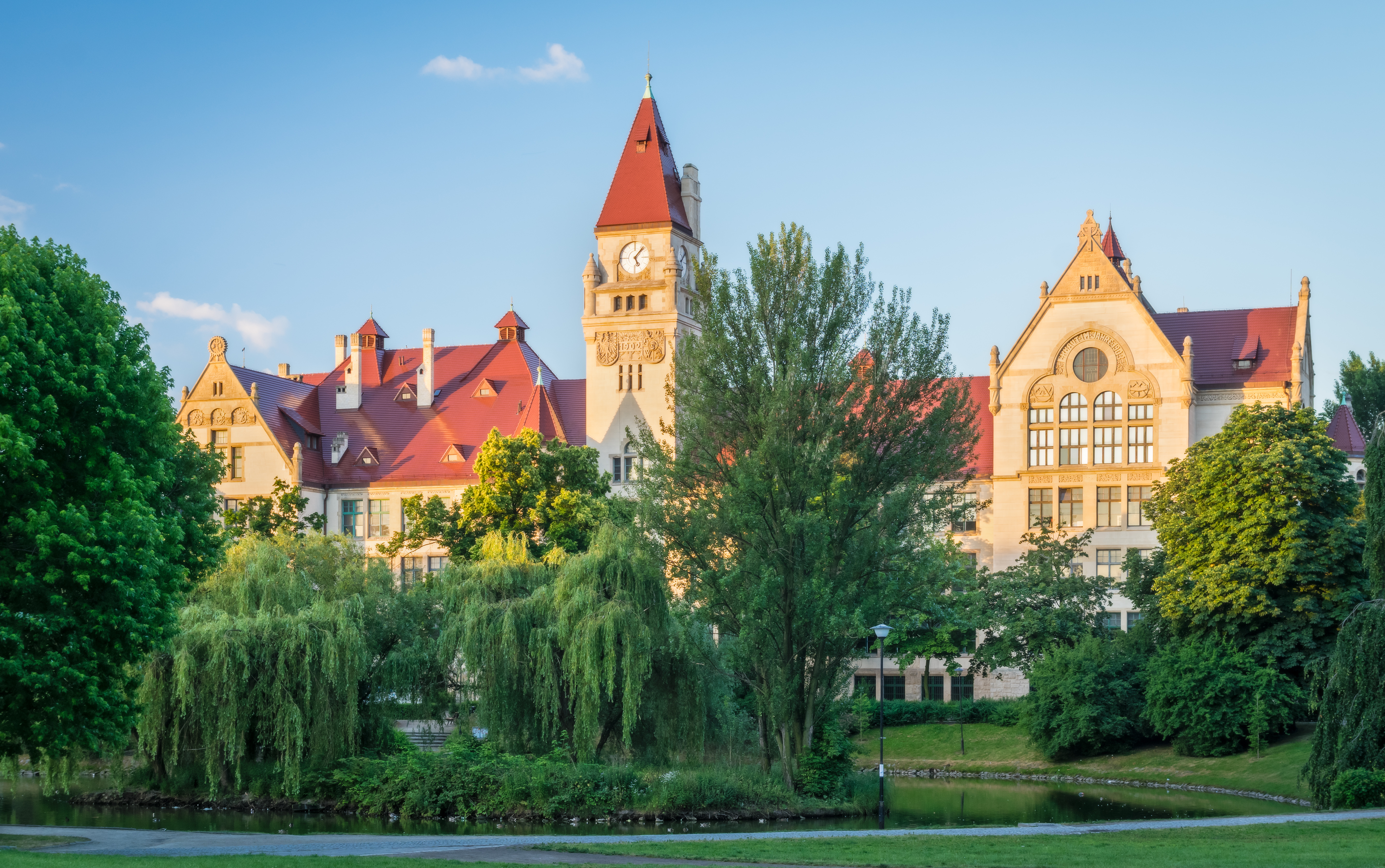 Wrocław, budynek politechniki ("Staadtbauschule"), 1901-1903